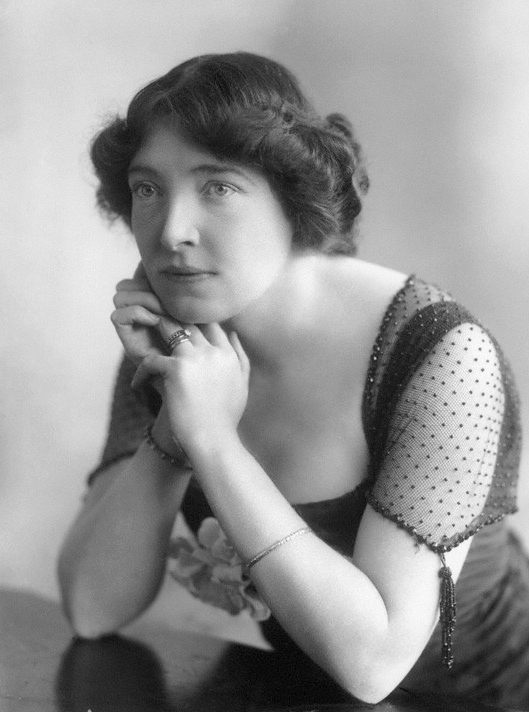 Irene Rooke